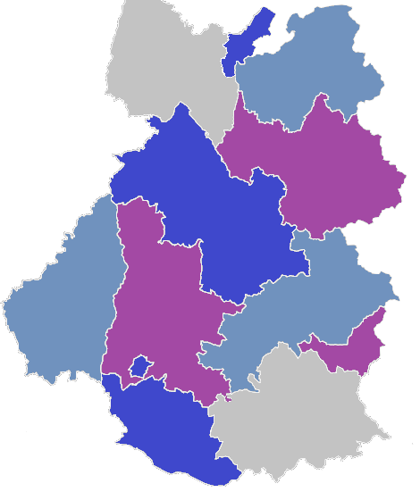 Départements de diffusion du journal : Isère, Savoie, Haute-Savoie, Drôme, Ardèche, Hautes-Alpes, Ain (Pays de Gex et Bellegarde), Vaucluse ainsi que la vallée de l'Ubaye dans les Alpes-de-Haute-Provence.